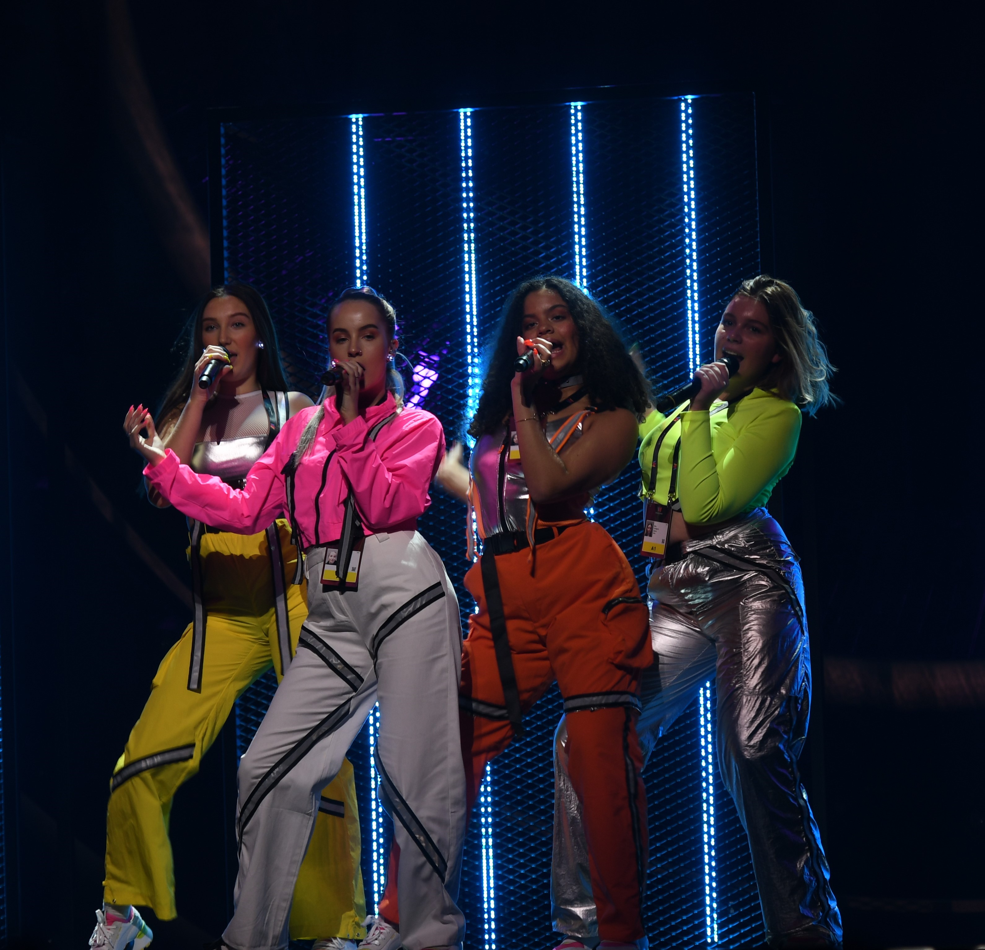 Melodifestivalen 2019, deltävling 1, Scandinavium, Göteborg, High 15